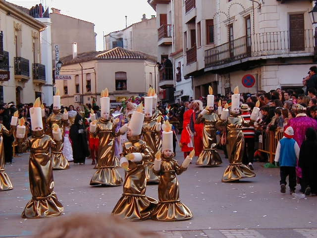 Autor: Jesús Ruiz